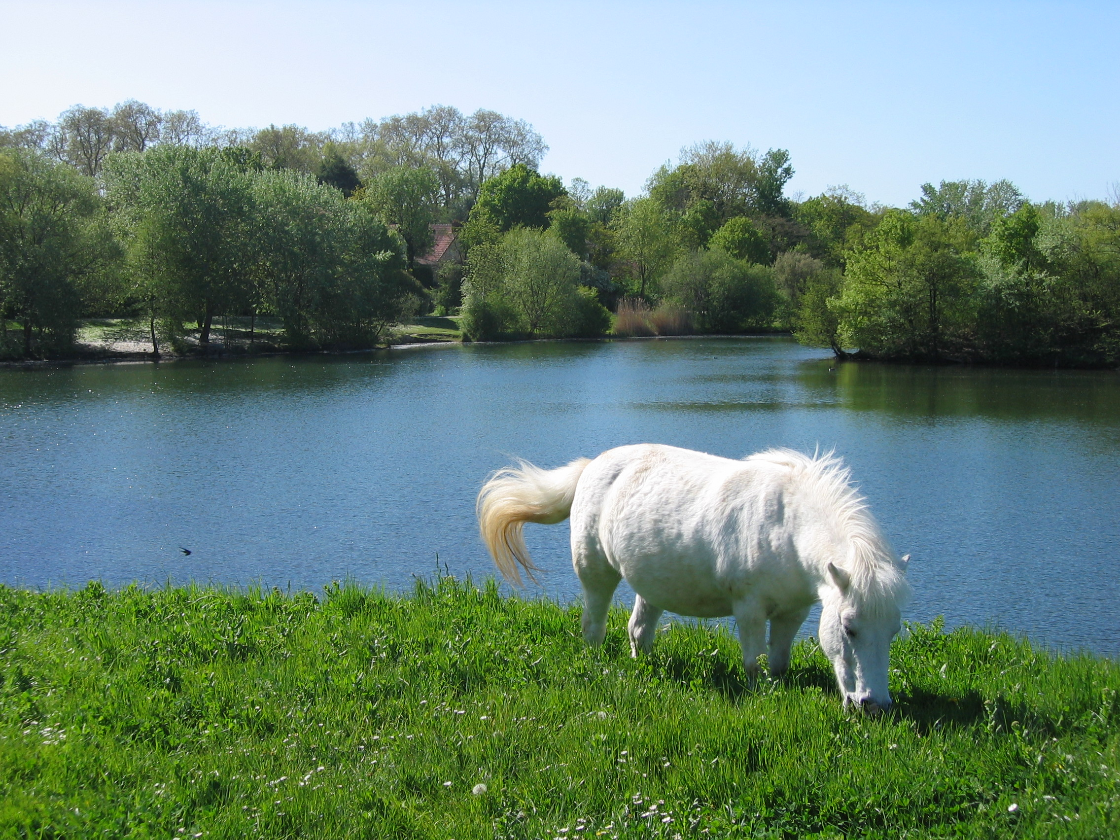 Base de plein air et de loisirs du Port-aux-Cerises